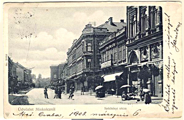 Miskolci Széchenyi utca 1903-ban